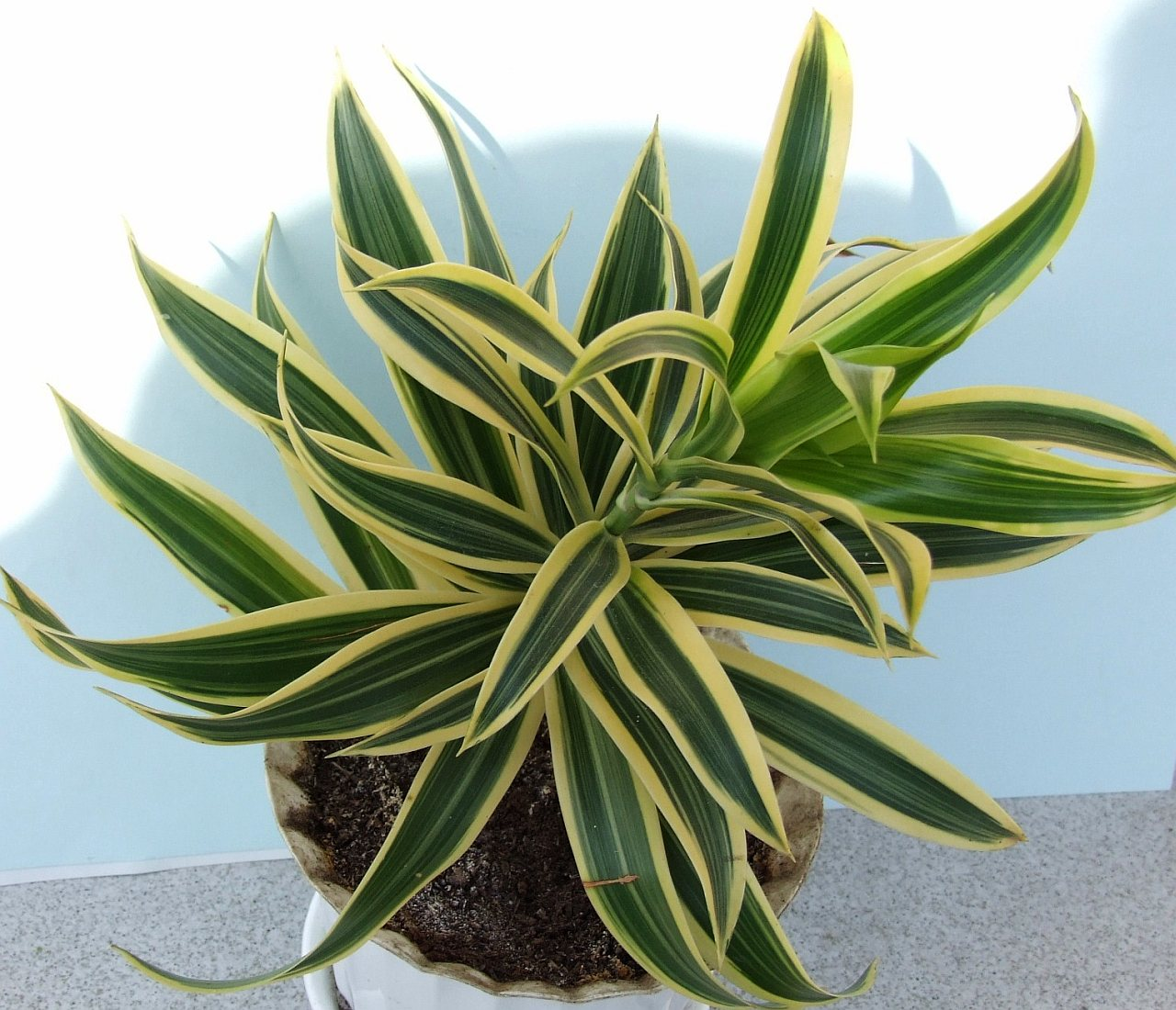 Dracaena reflexa